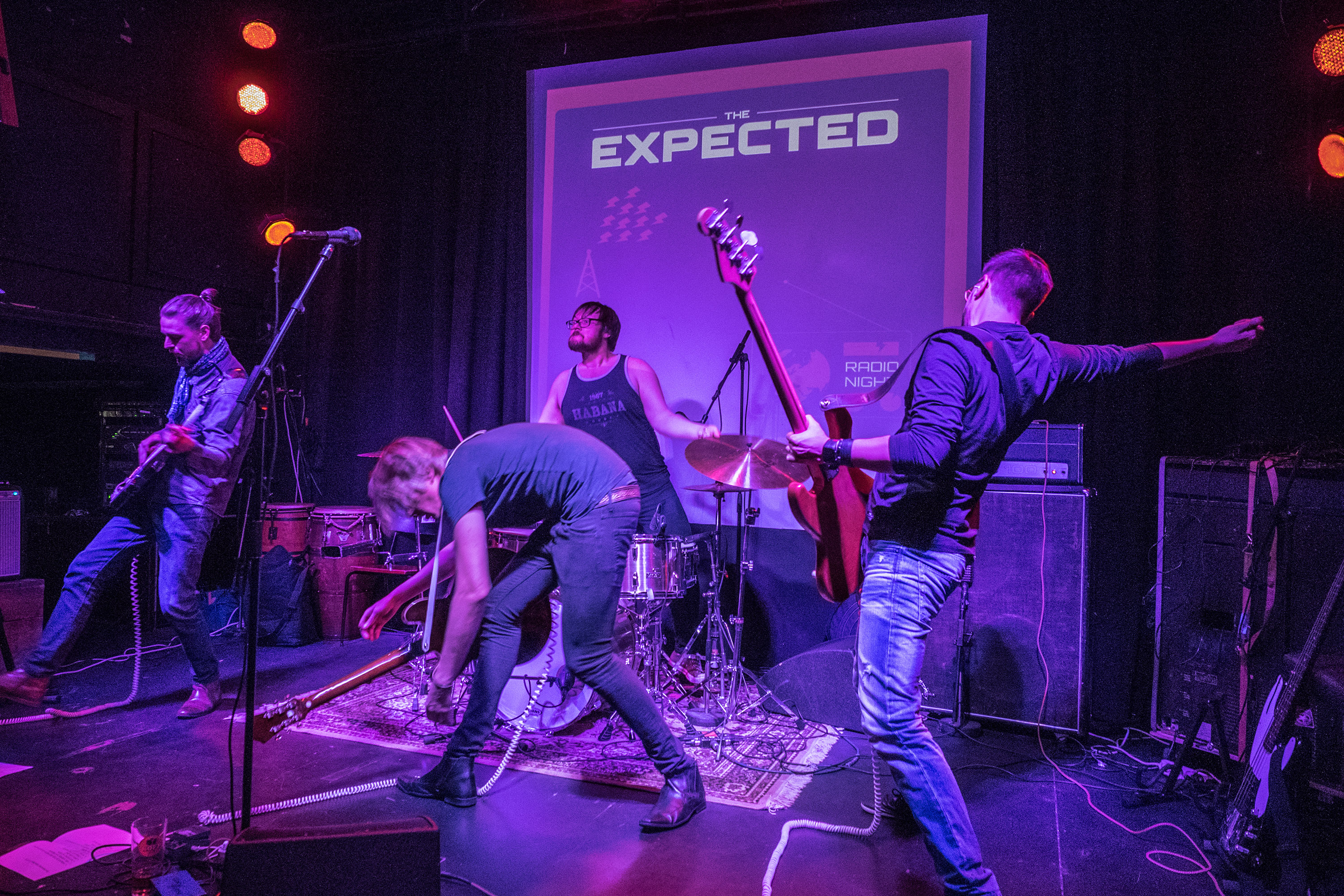 The Expected soittamassa Semifinalissa